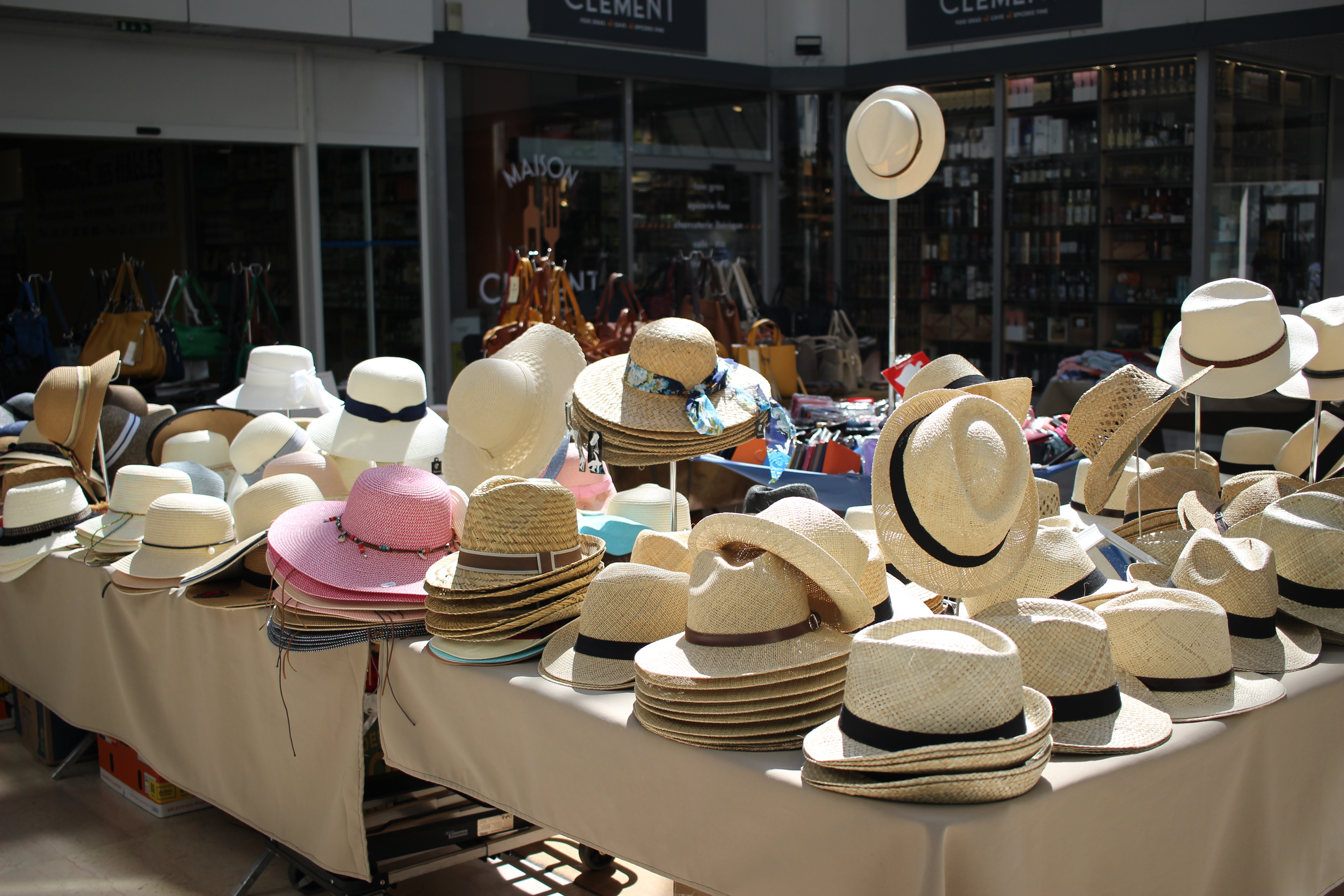 Tours - Halles de Tours - Avril 2019 - Chapeaux